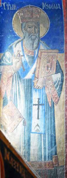 Тополчани, црква Вознесение Христово, св. Методија, јужен ѕид